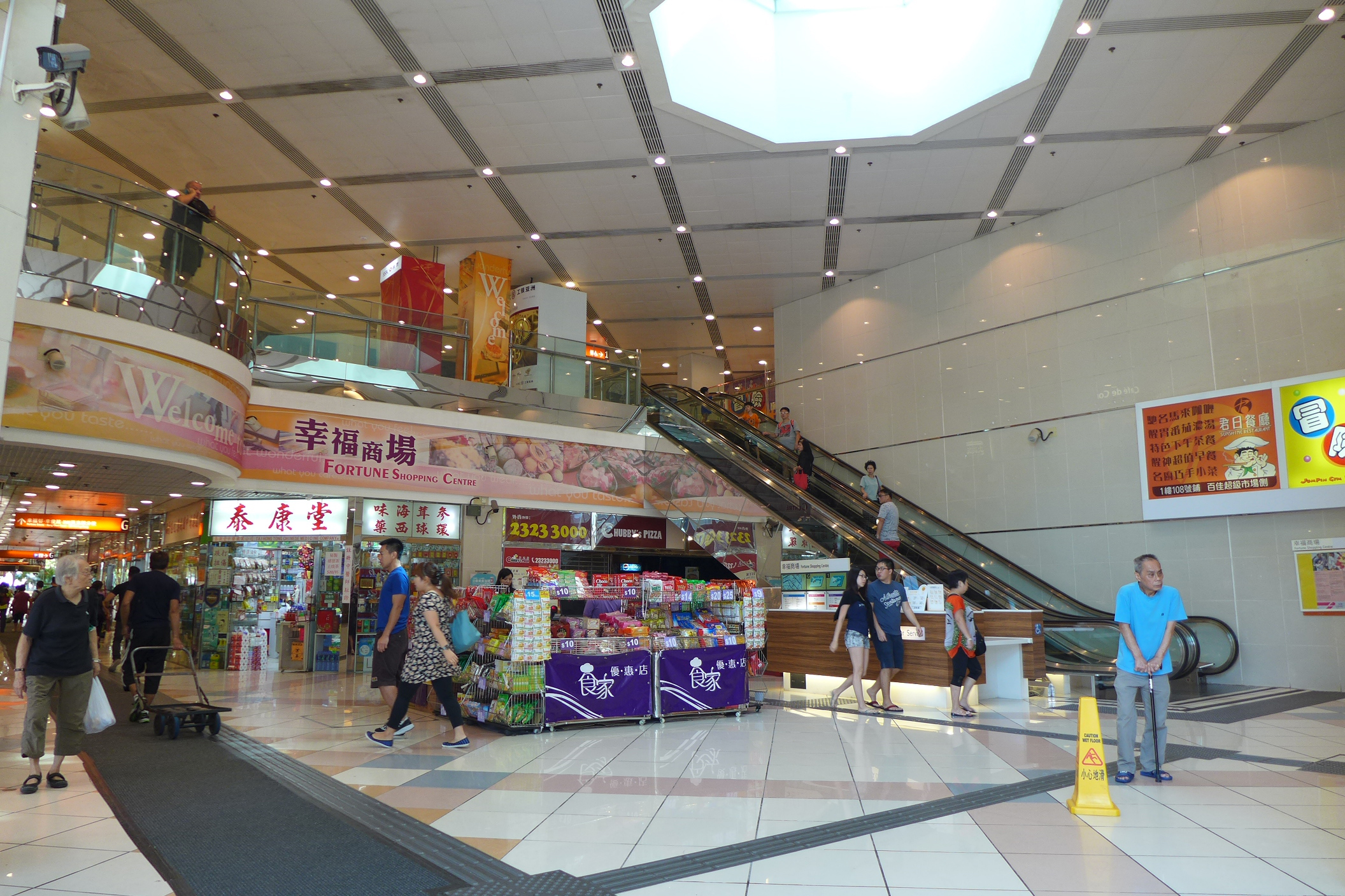 Fortune Estate Shopping Arcade Void